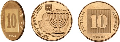 Израильские 10 агор 1985 года выпуска. Гурт аверс и реверс.